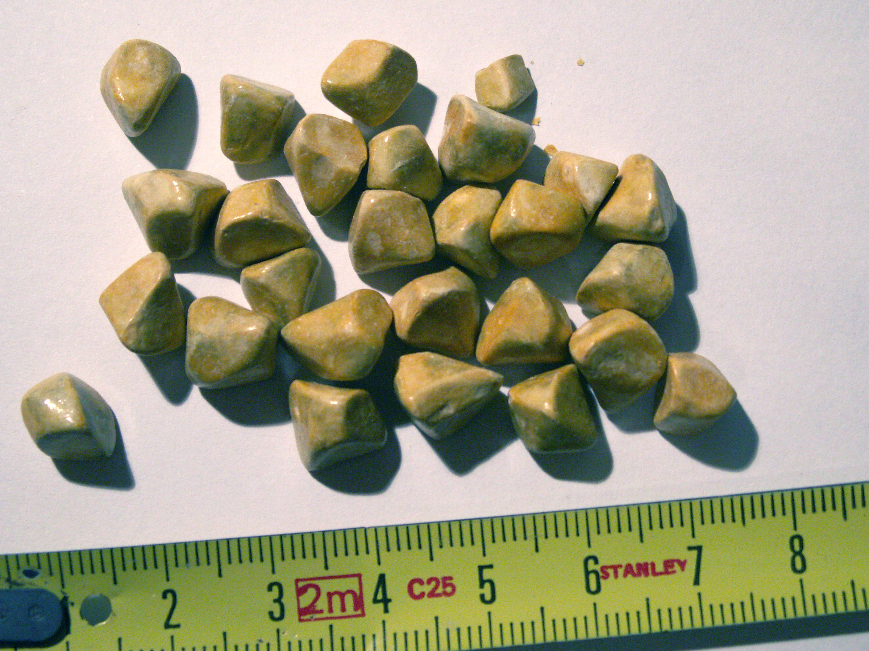 Gallensteine biliary gallstones bilestone Autor: Stell98